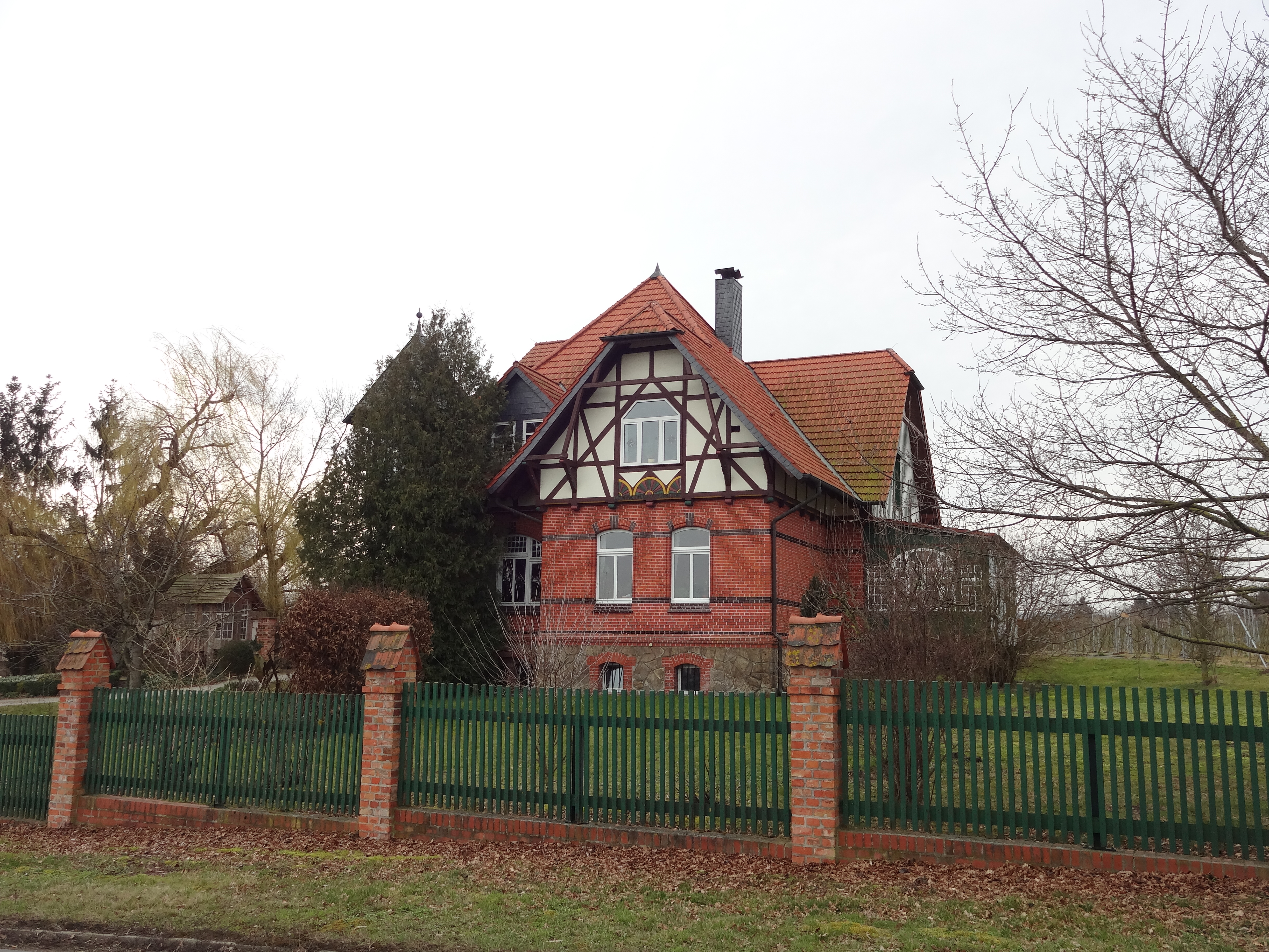 denkmalgeschützte Villa in der Bleichstraße 63 in Derenburg, Ortsteil von Blankenburg (Harz)